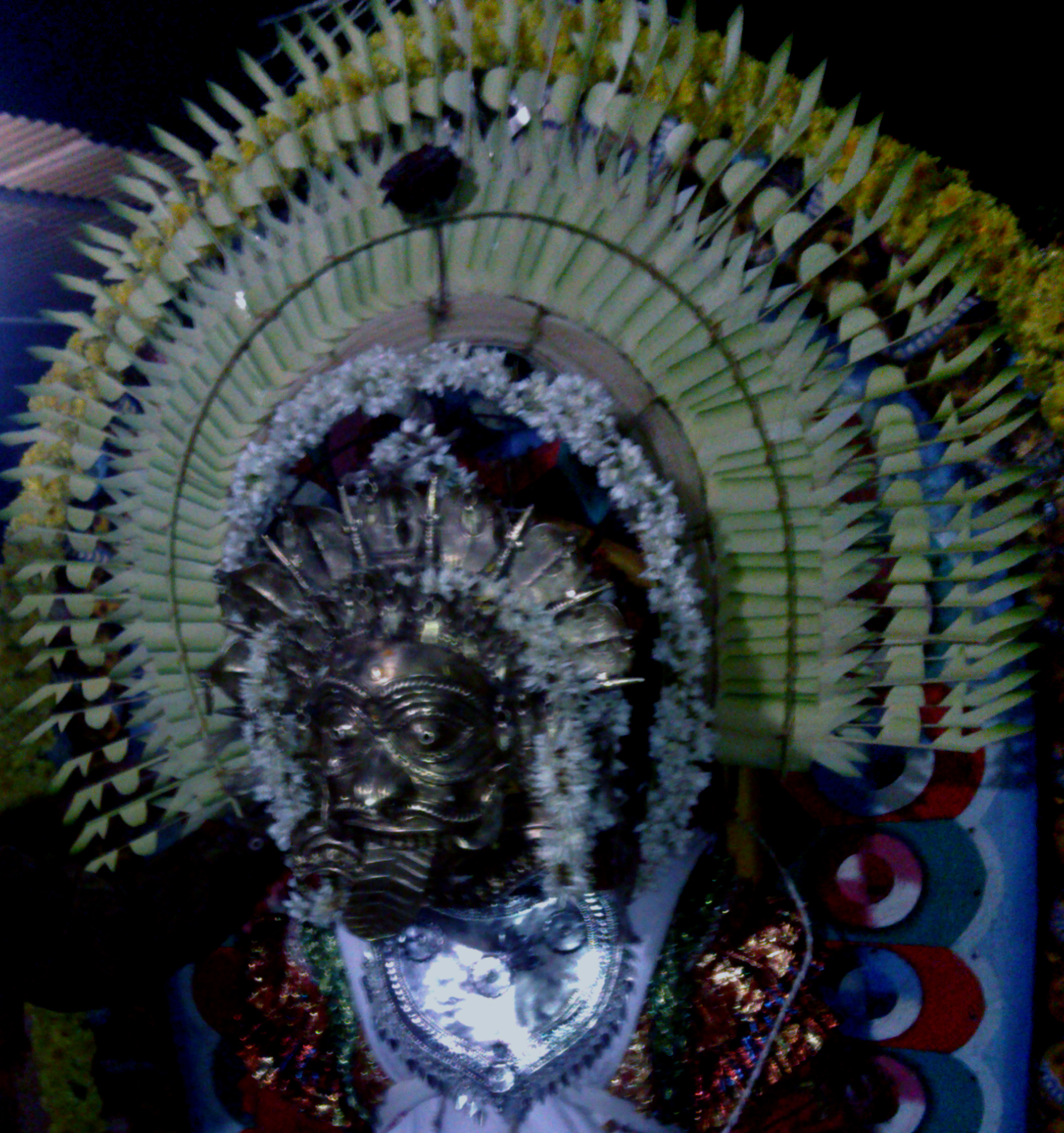 ಕನ್ನಡ: ಚಾಮುಂಡಿ ಭೂತೊ - 3